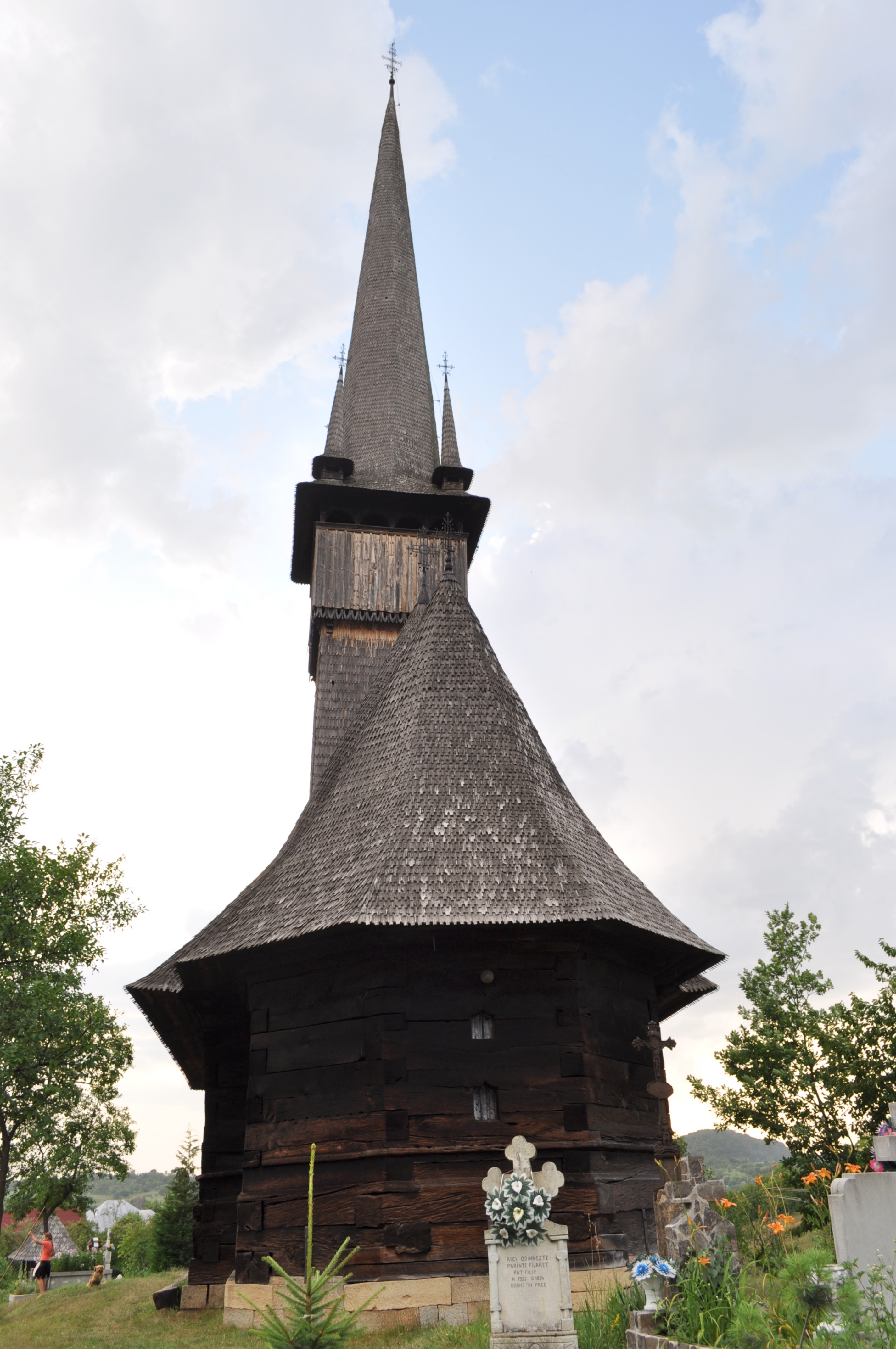 Biserica de lemn "Sfinții Arhangheli Mihail şi Gavril", sat PLOPIŞ; comuna ŞIŞEŞTI